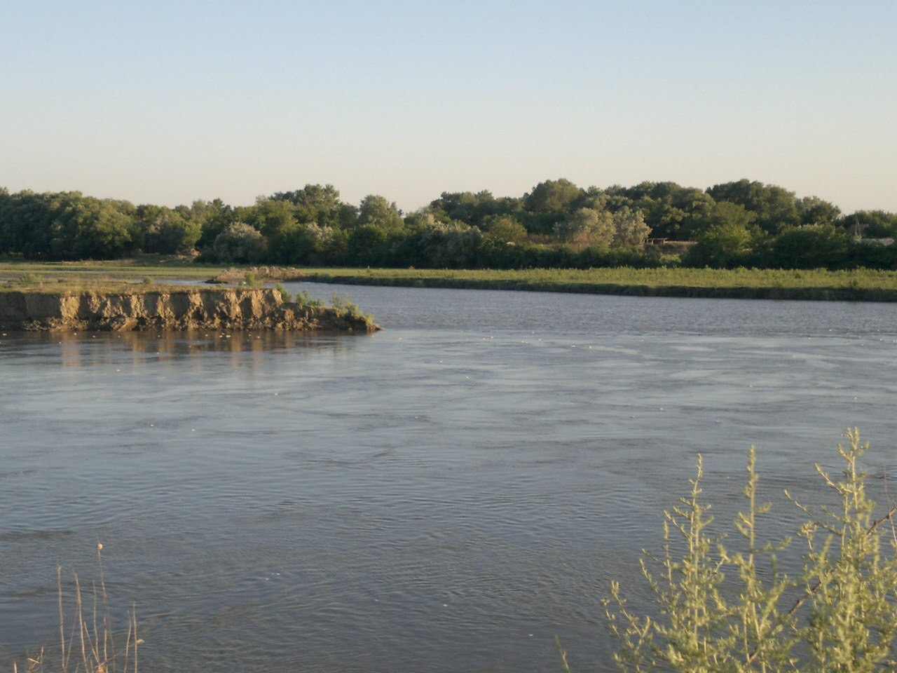 Река Терек на границе Кизлярского и Бабаюртовского районов Дагестана